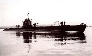 Le sous-marin « Morse » en manœuvre, à l'automne 1939, alors que le poète Jean Venturini venait d'y être engagé.